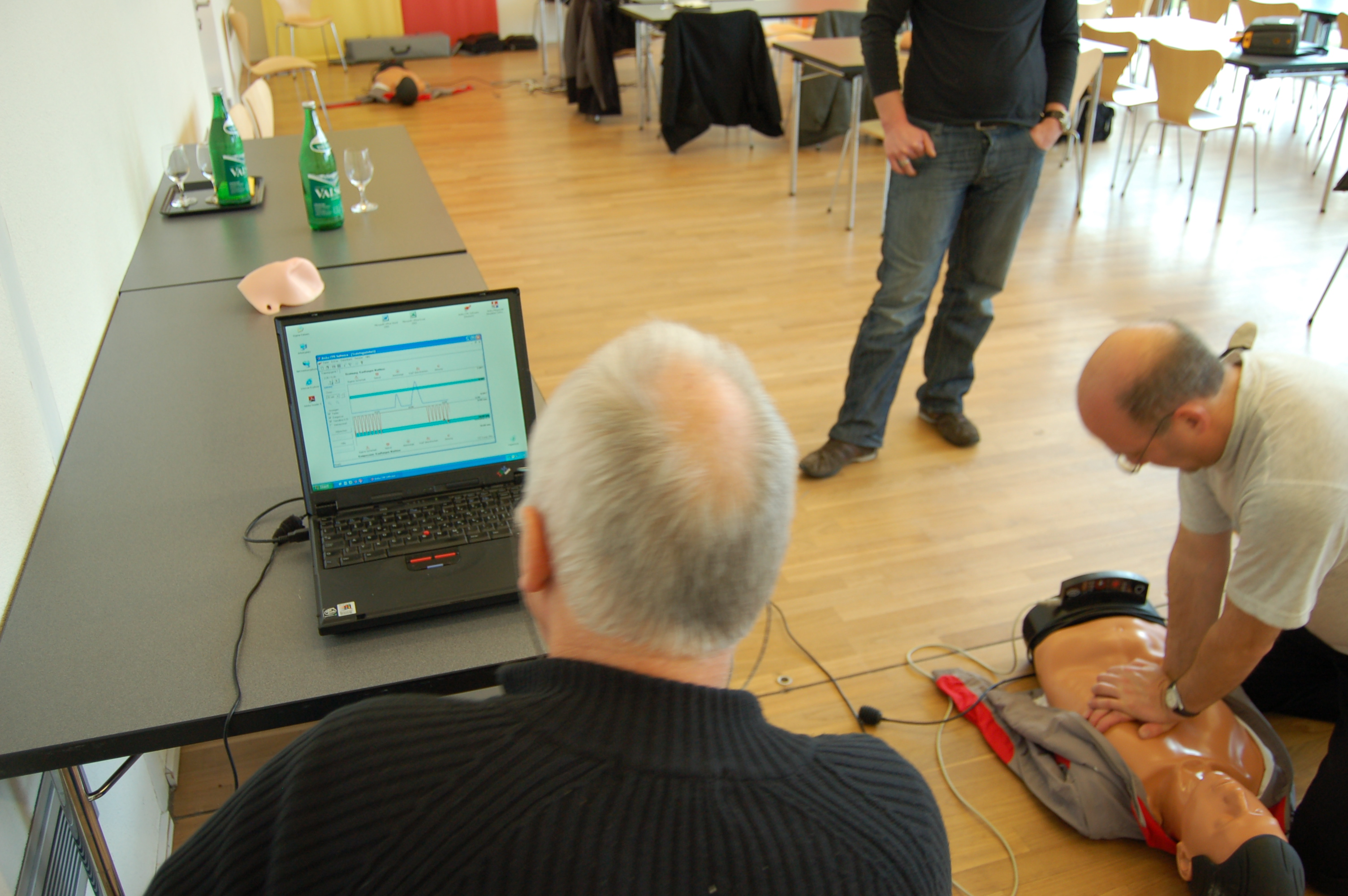 CPR Auswertung am PC